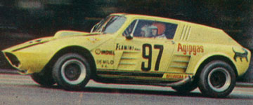 La siguiente fotografía muestra un prototipo denominado "La Garrafa", creado por los Hermanos Bellavigna y motorizado por Chevrolet, para correr en Turismo Carretera. Se desconocen los datos de su autor, ya que la misma fué tomada hace más de 25 años.